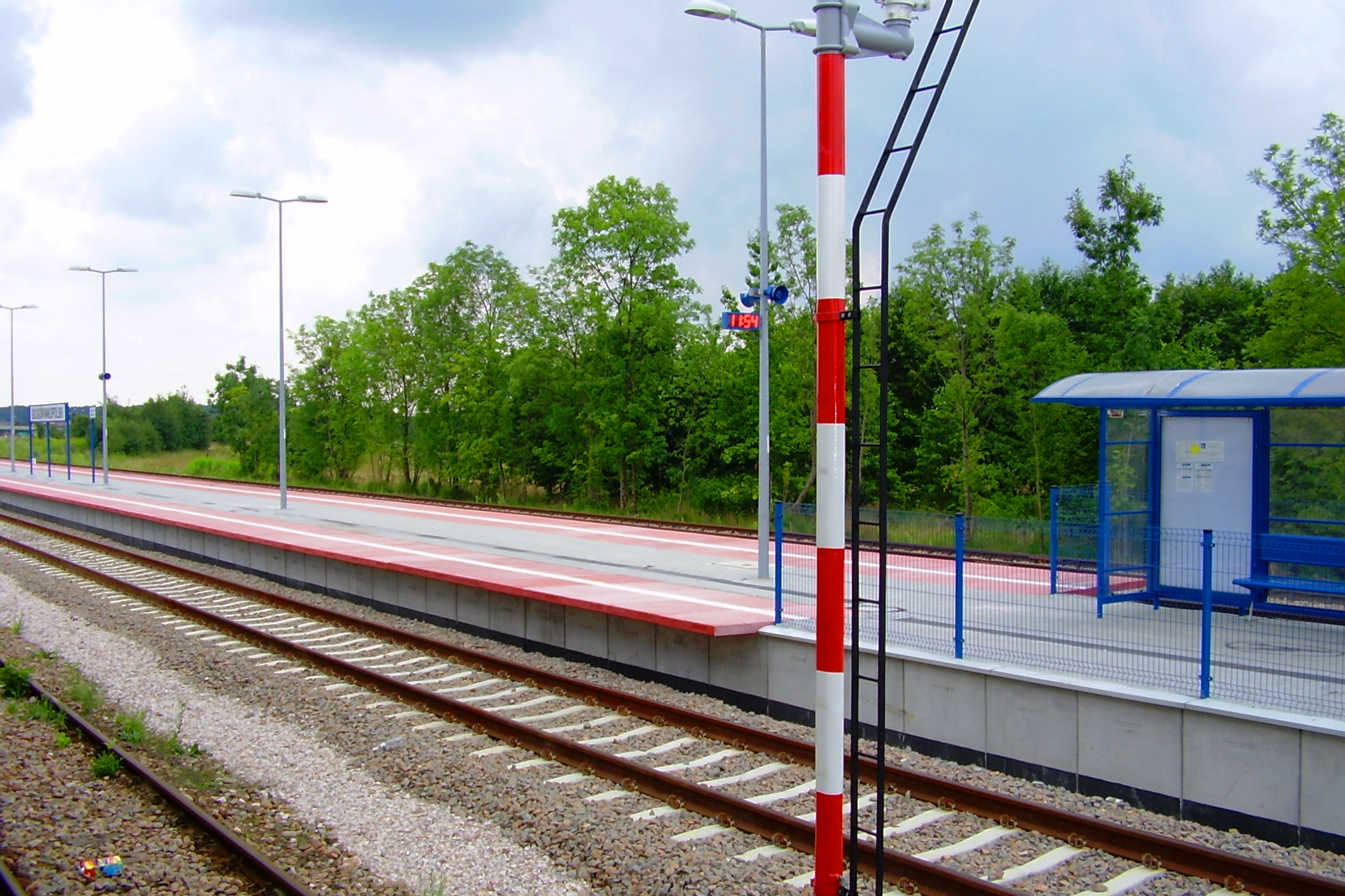 Stacja kolejowa w Głogowie Małopolskim, 2011-07-29